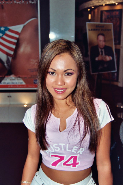 Sabrine Maui